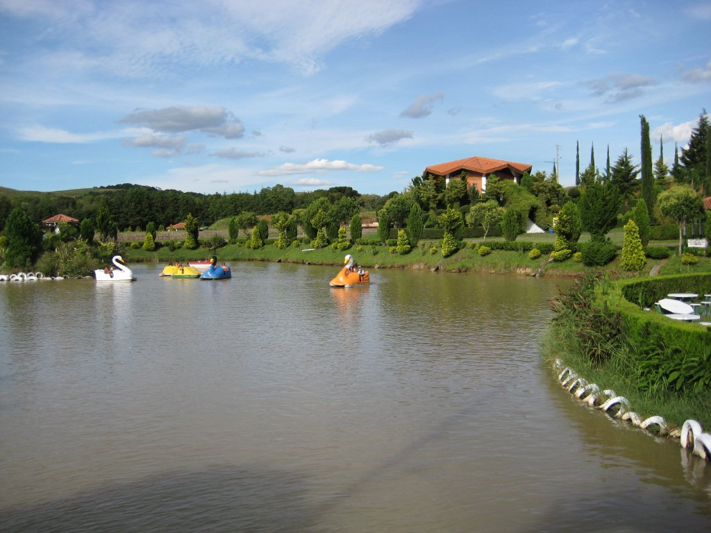 Parque das Tuias, em Soledade, Rio Grande do Sul, Brasil.